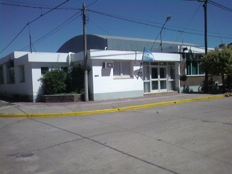 Escuela Secundaria en Moquehuá, partido de Chivilcoy, provincia de Buenos Aires, Argentina